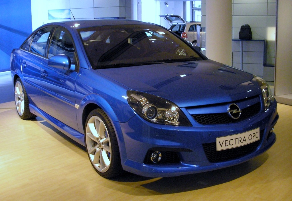 Description: Opel Vectra, im Opel Zentrum in Berlin an der Friedrichstraße. The Opel Vectra, image taken at the Opel Zentrum in Berlin at Friedrichstraße. Source: self-made, I release it into the public domain. Gryffindor 17:50, 9 March 2006 (UTC)